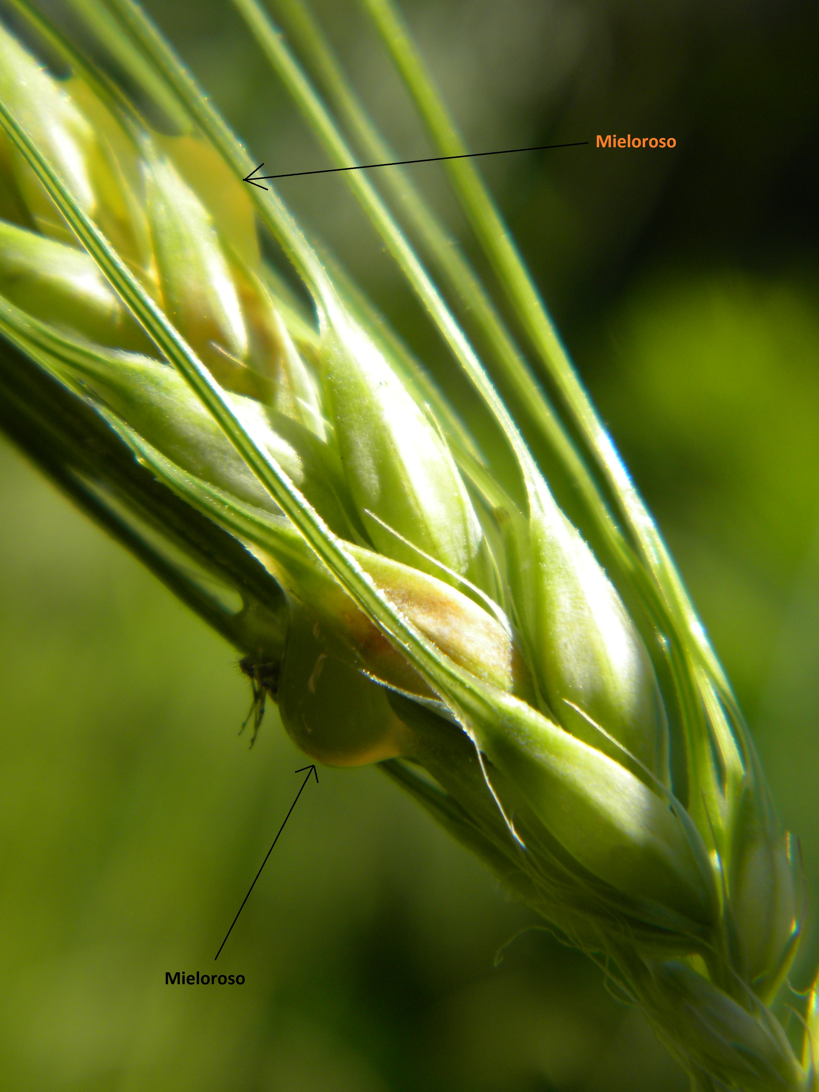 Miellat du à Sphacelia segetum sur Hordeum vulgare